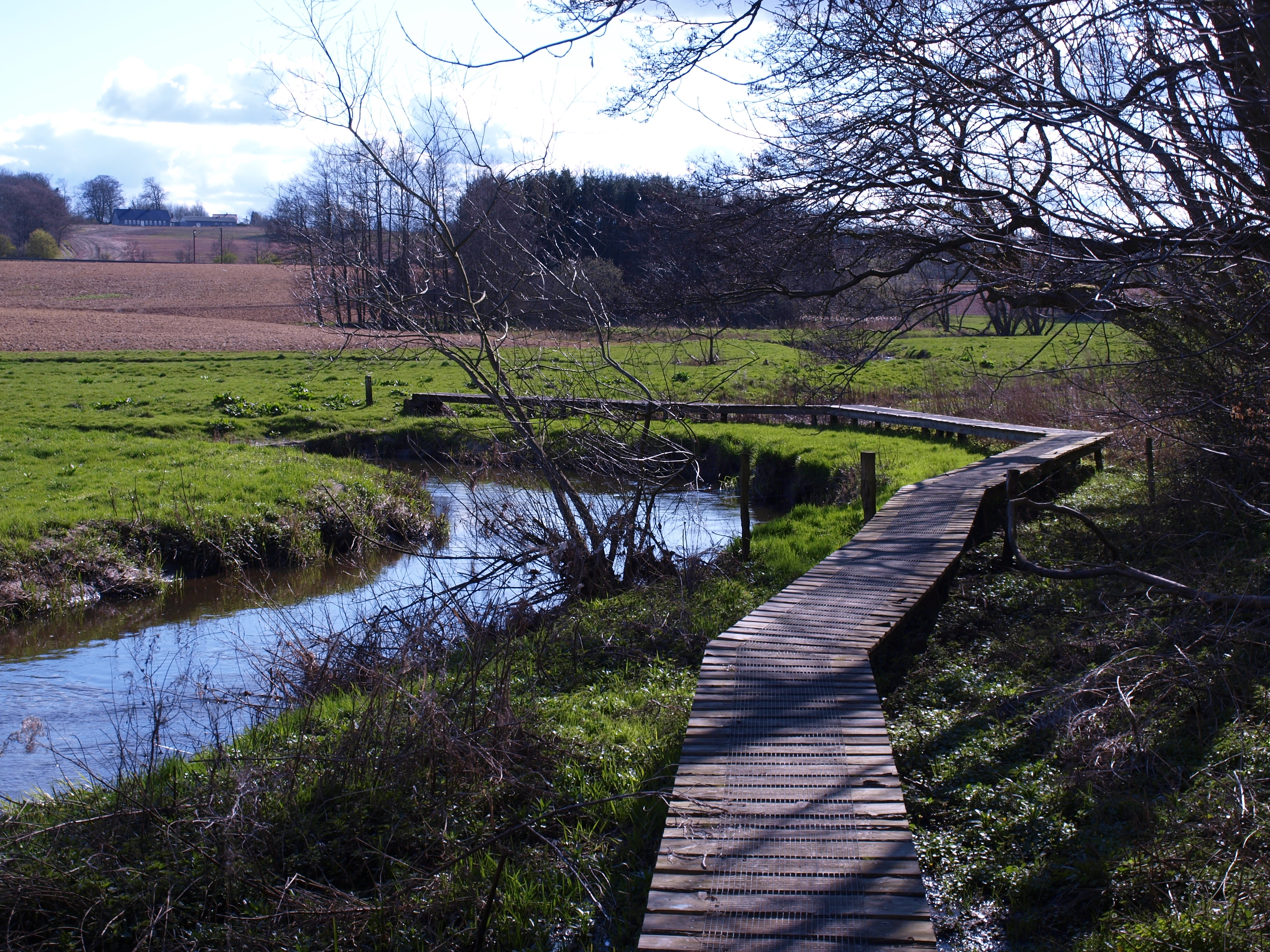 Påby Eng, april 2015